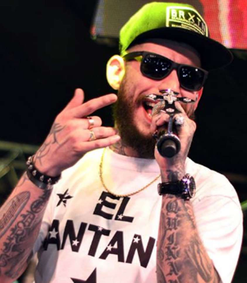 Ulises Bueno 2020